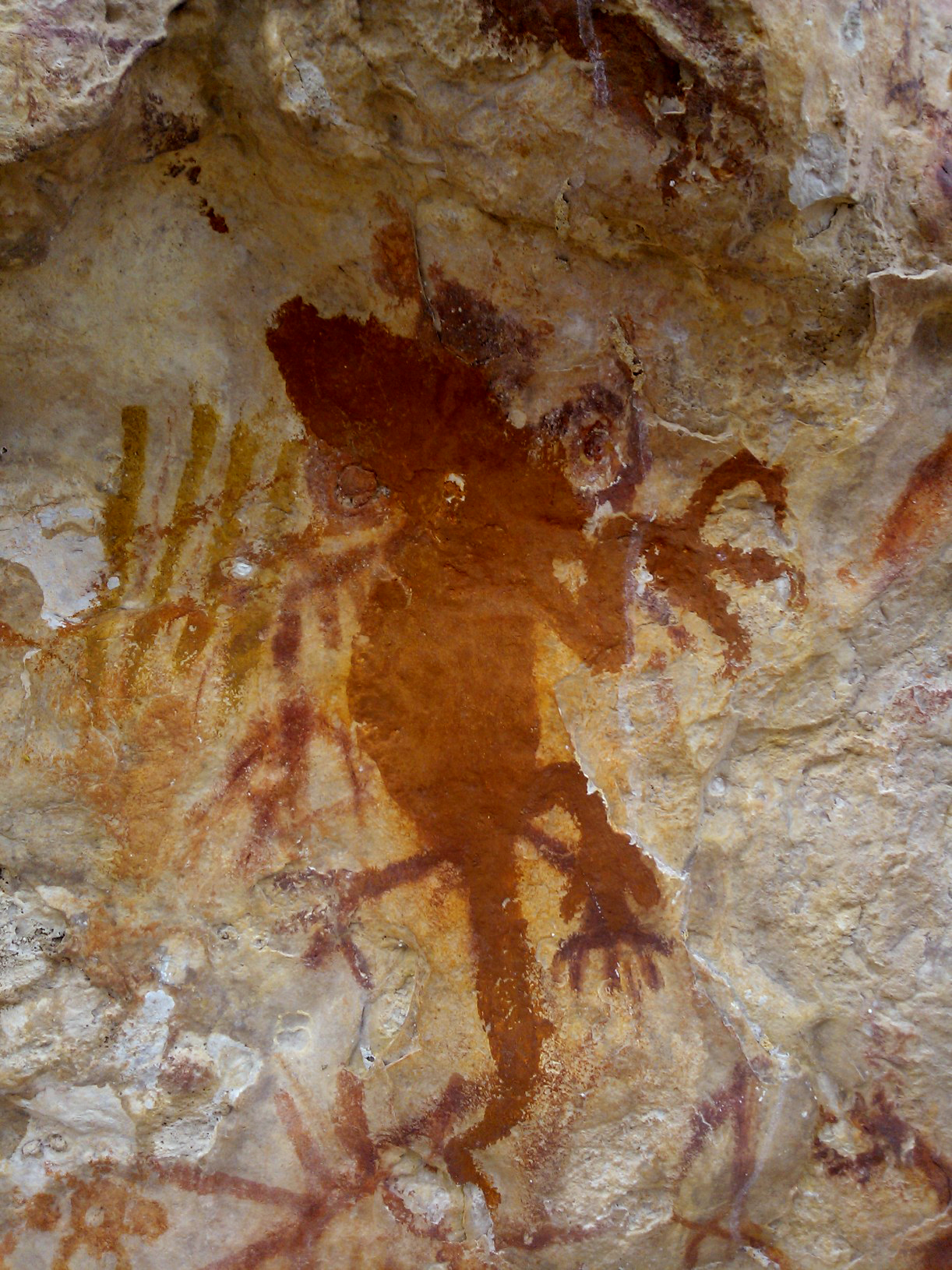 Lukisan cadas corak kadal di Kaimana, Papua.